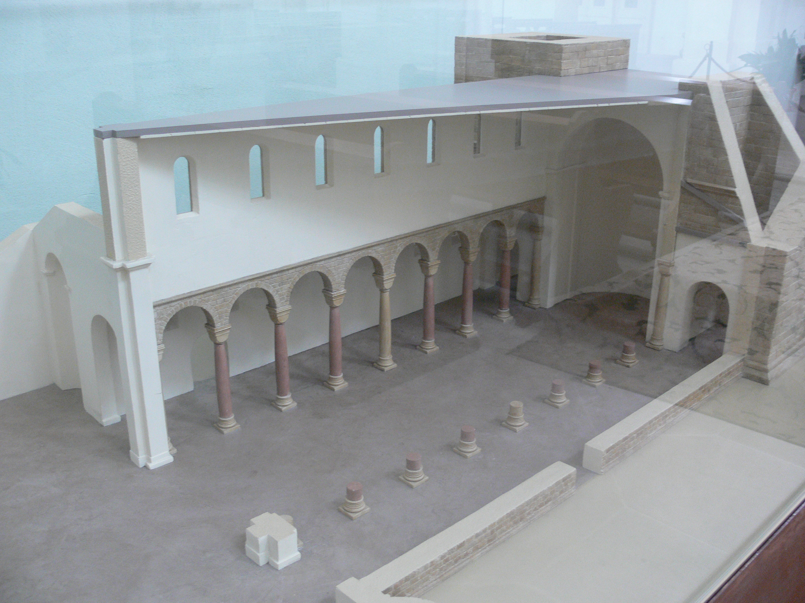 Bamberg, ehem. Stiftskirche St. Jakob Modell der Kirche